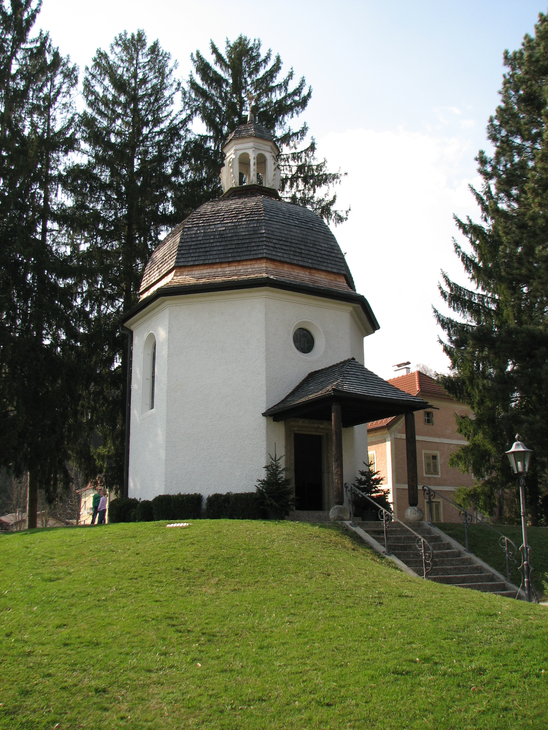 Stille-Nacht-Gedächtniskapelle